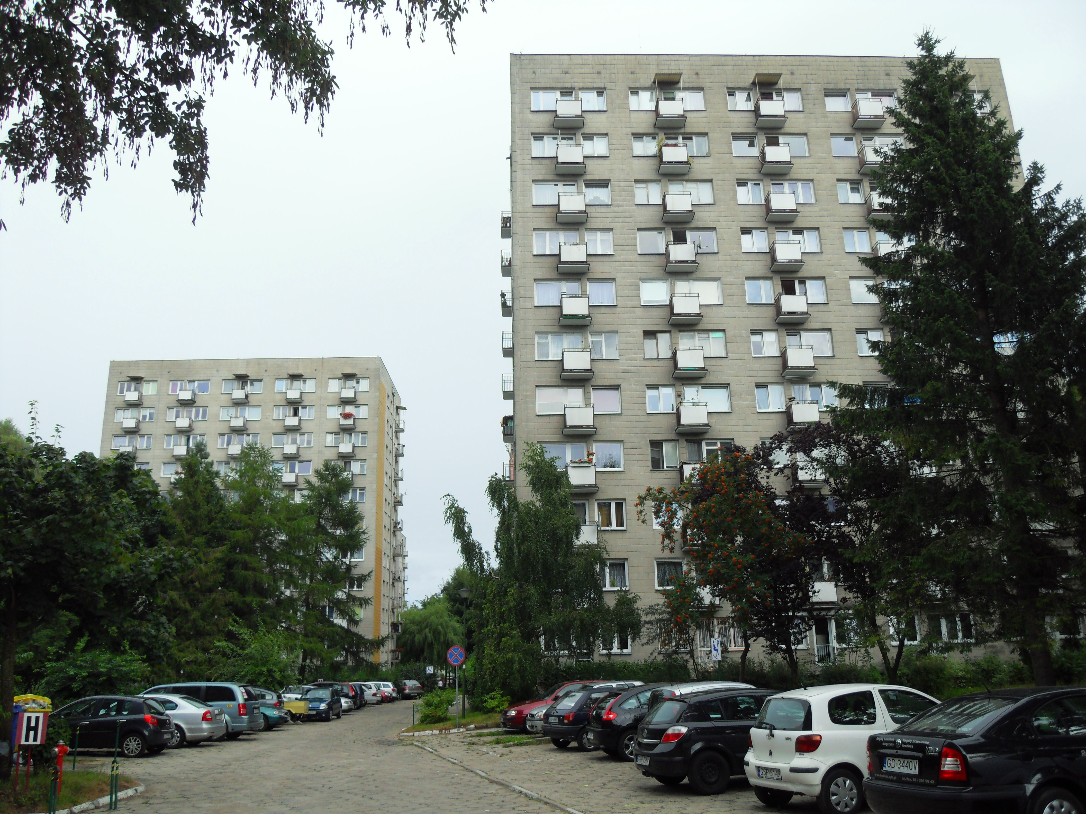 Sopot Przylesie, ul. 23 Marca 91A (po lewej) i 91B (po prawej).